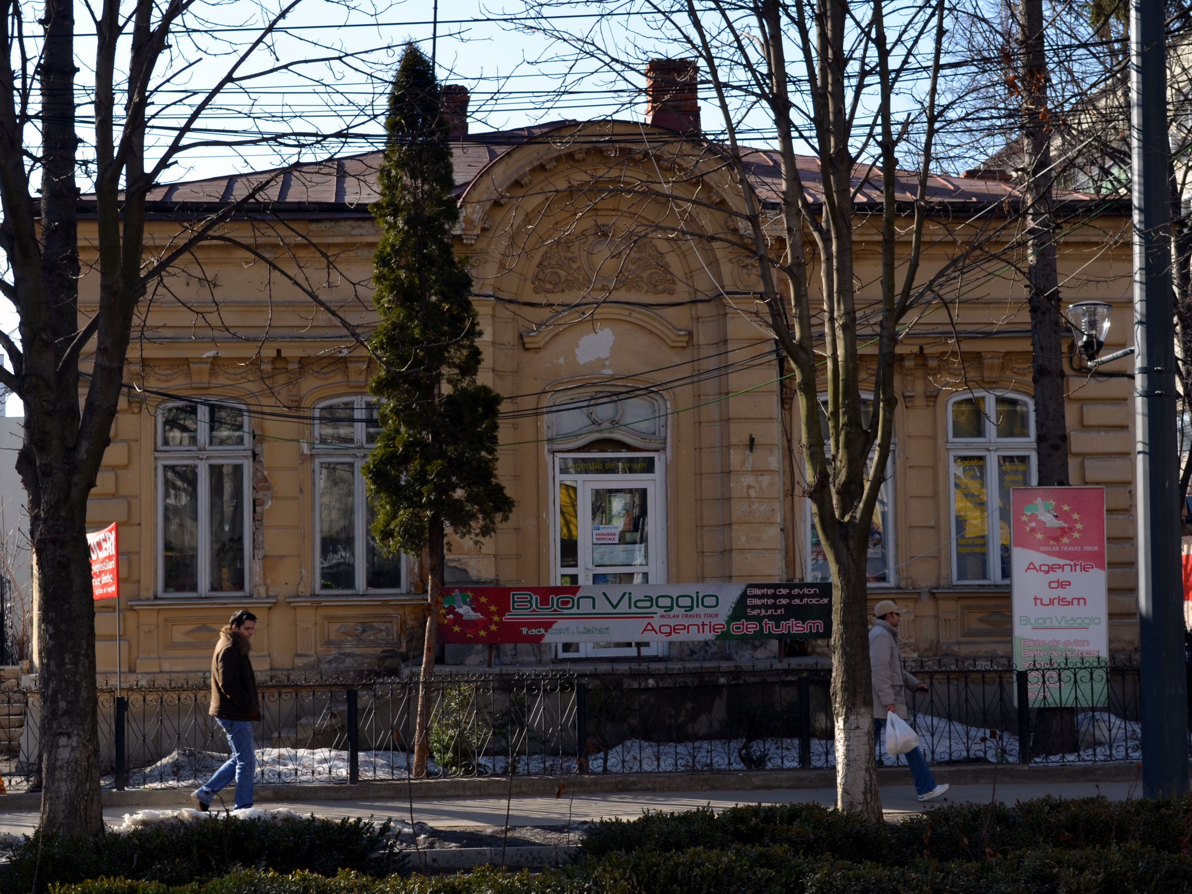 Casa Irina Luchian, astăzi Agenția de turism Buon Viaggio (Str. Ștefan cel Mare nr. 59, Vaslui)